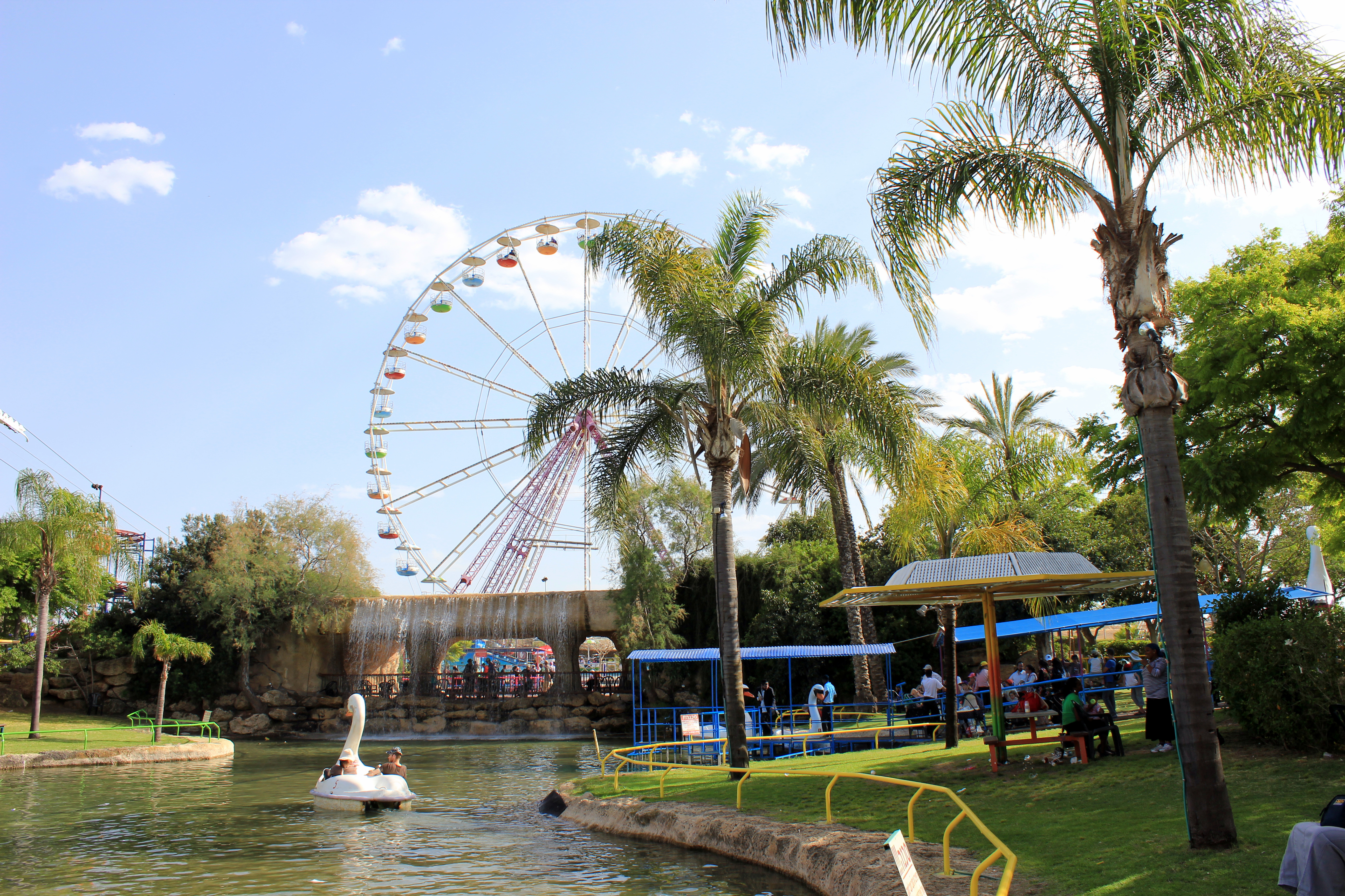 IMG_6096 Superland amusement park